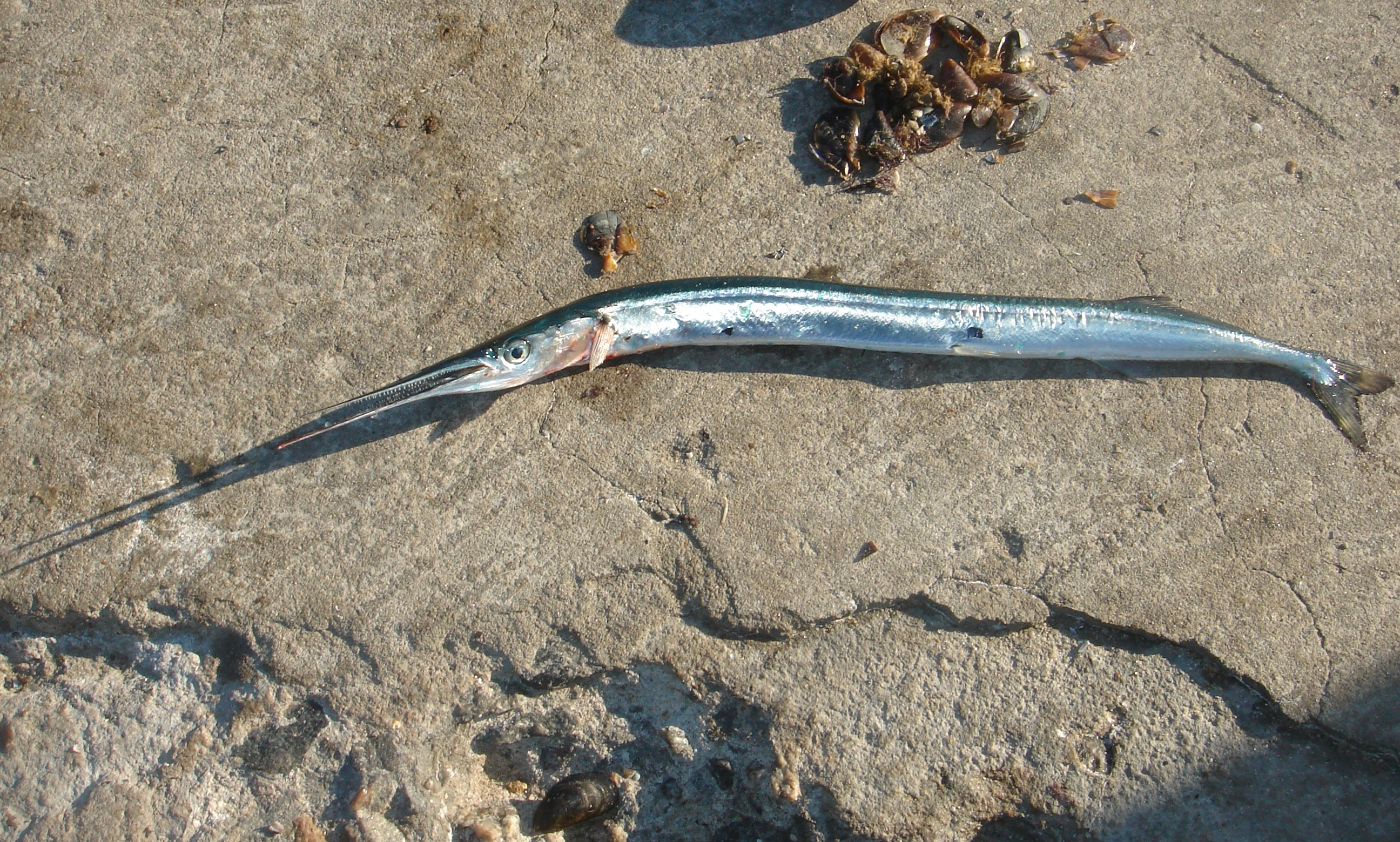 Черноморский сарган